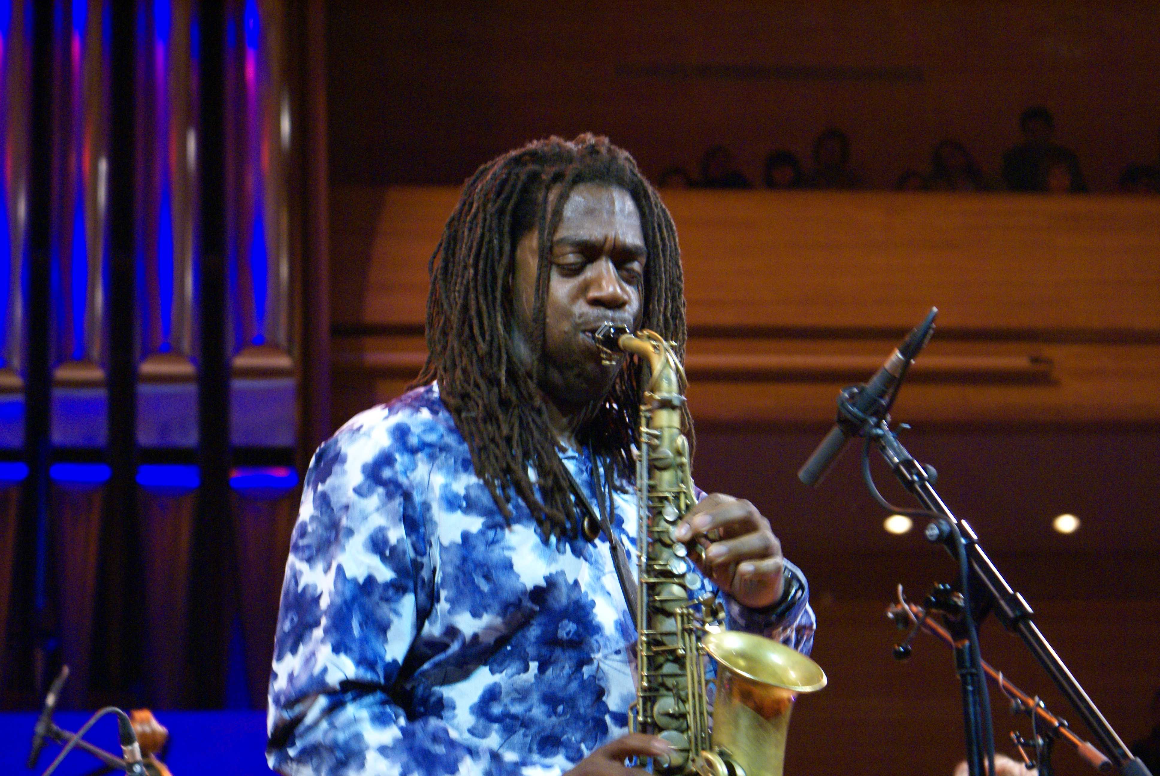 Йосвани Терри Кабрера на концерте в Москве в 2008 году